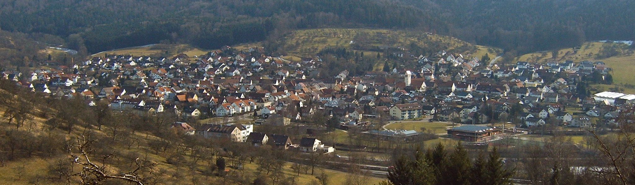 Waldhausen, 2009